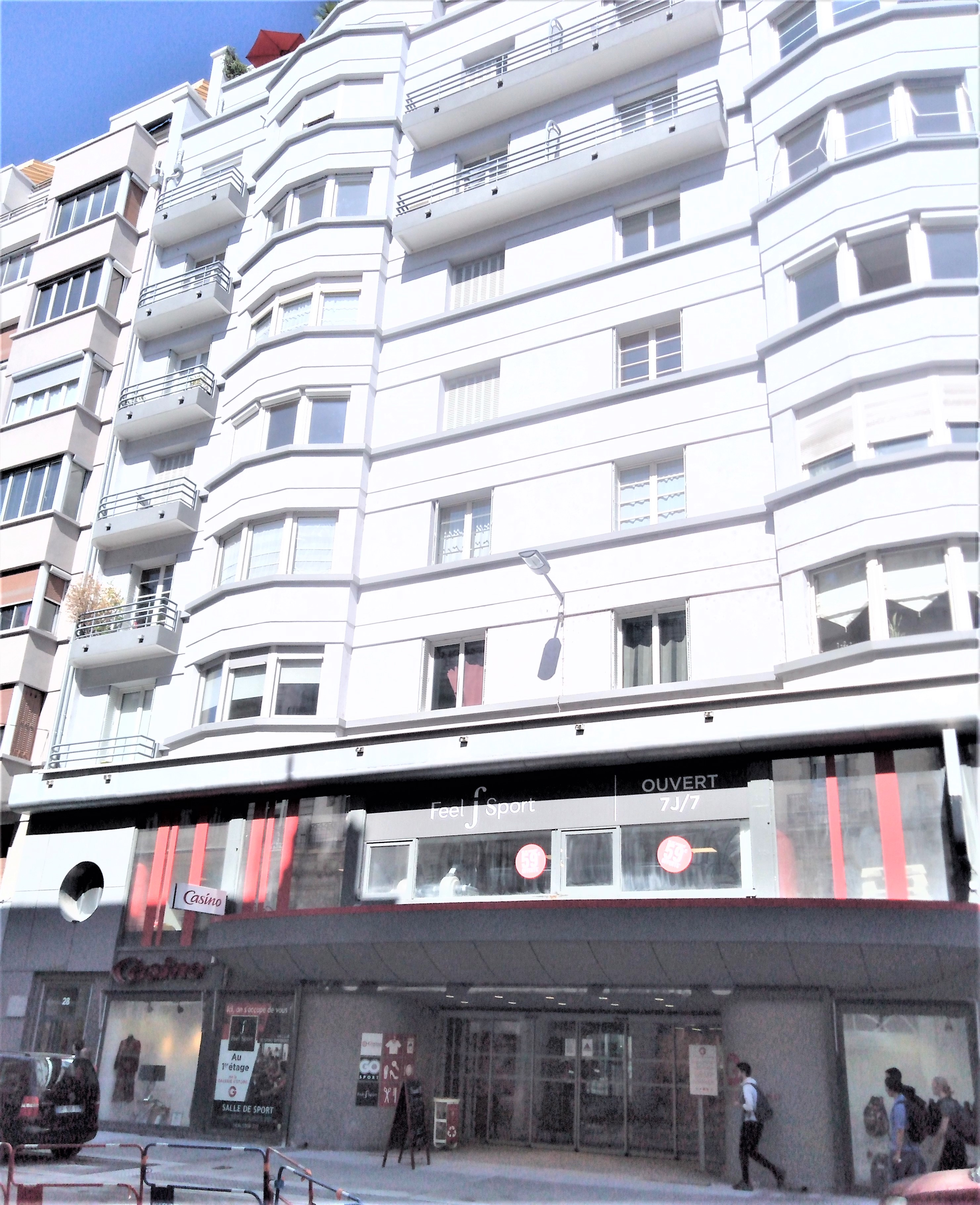 Immeuble "années 1930" du 26, Cours Berriat à Grenoble